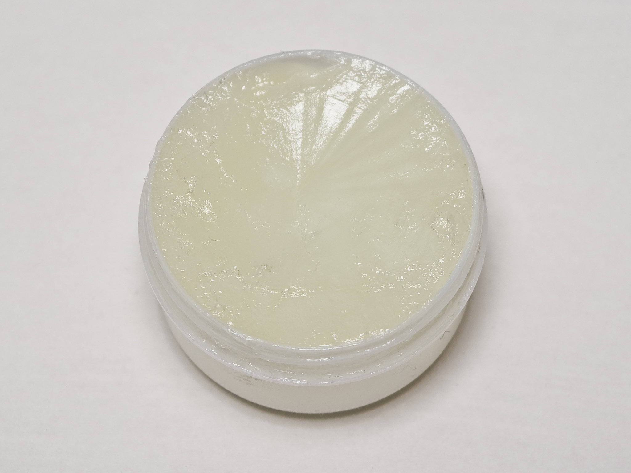 White Petrolatum (vaseline)